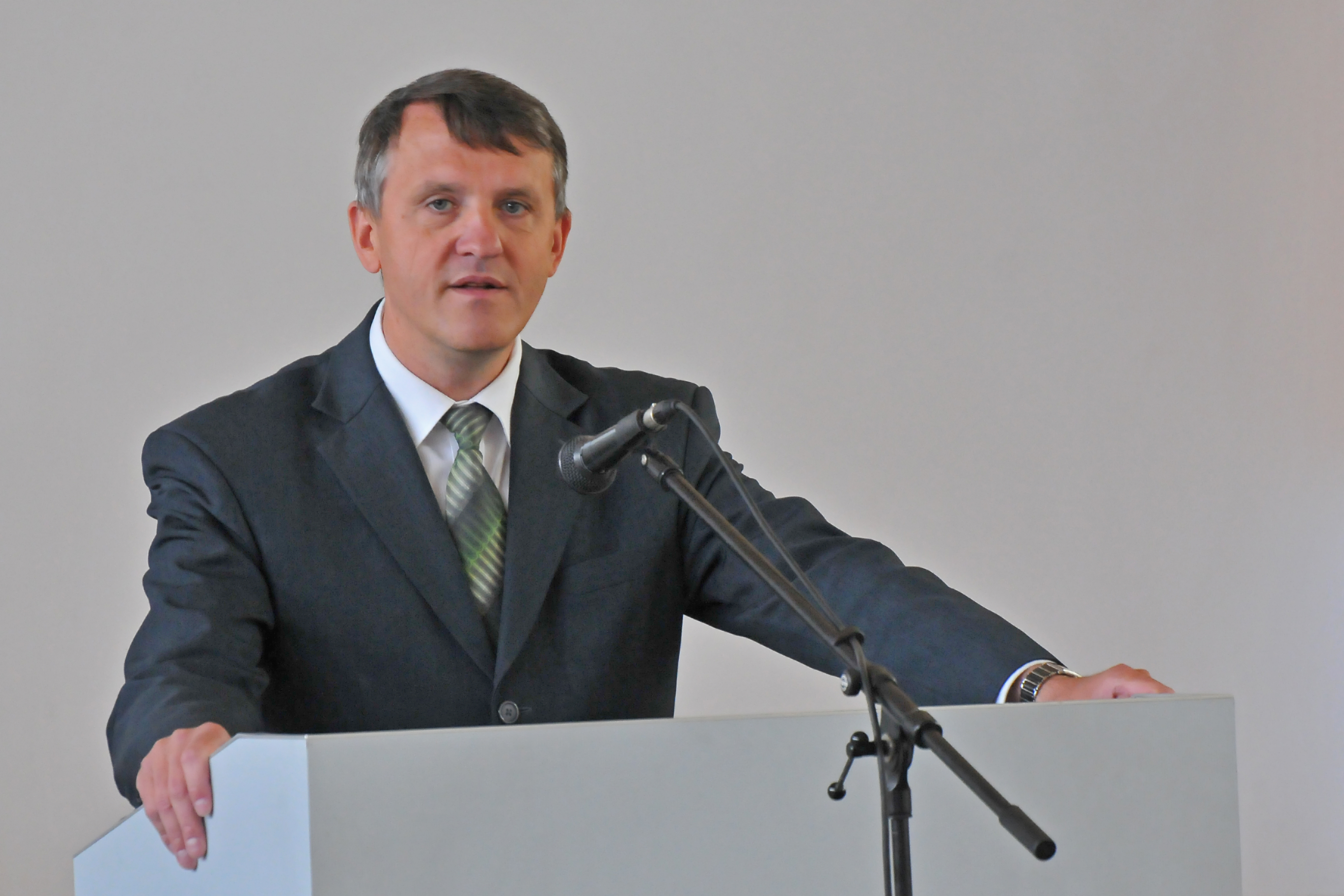 Dr. Manfred Wilde beim Regionalen Wirtschaftstag in Delitzsch am 14. Juni 2012